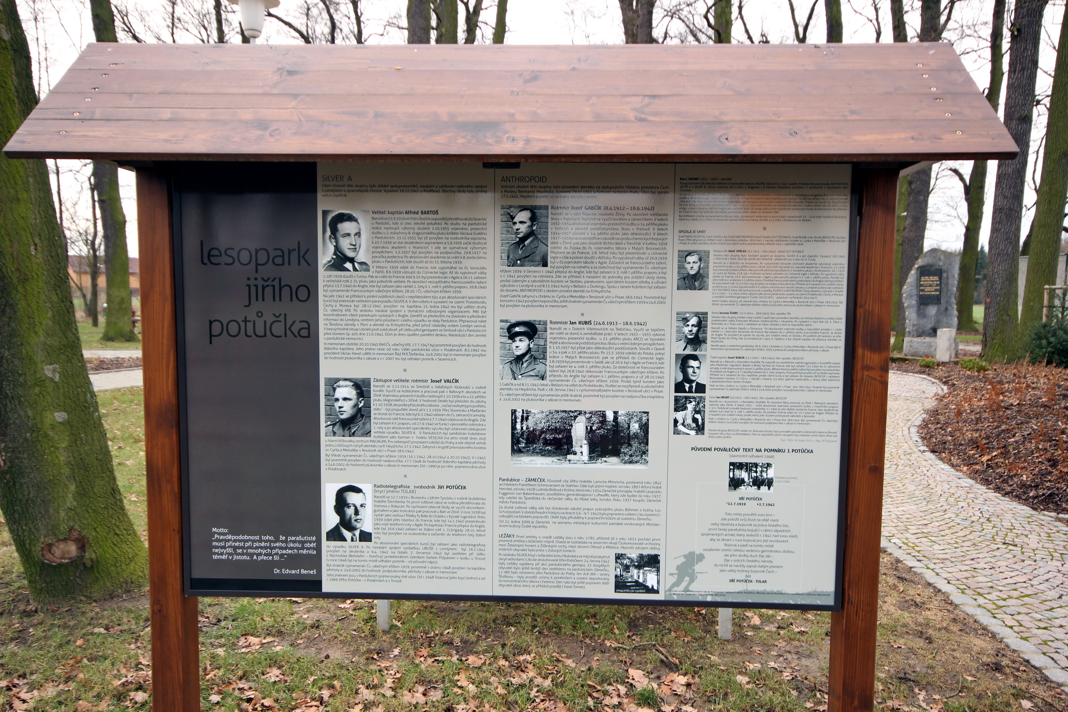 Lesopark Jiřího Potůčka, Pardubice - Trnová This photograph was taken with a DSLR from WMCZ's Camera grant.